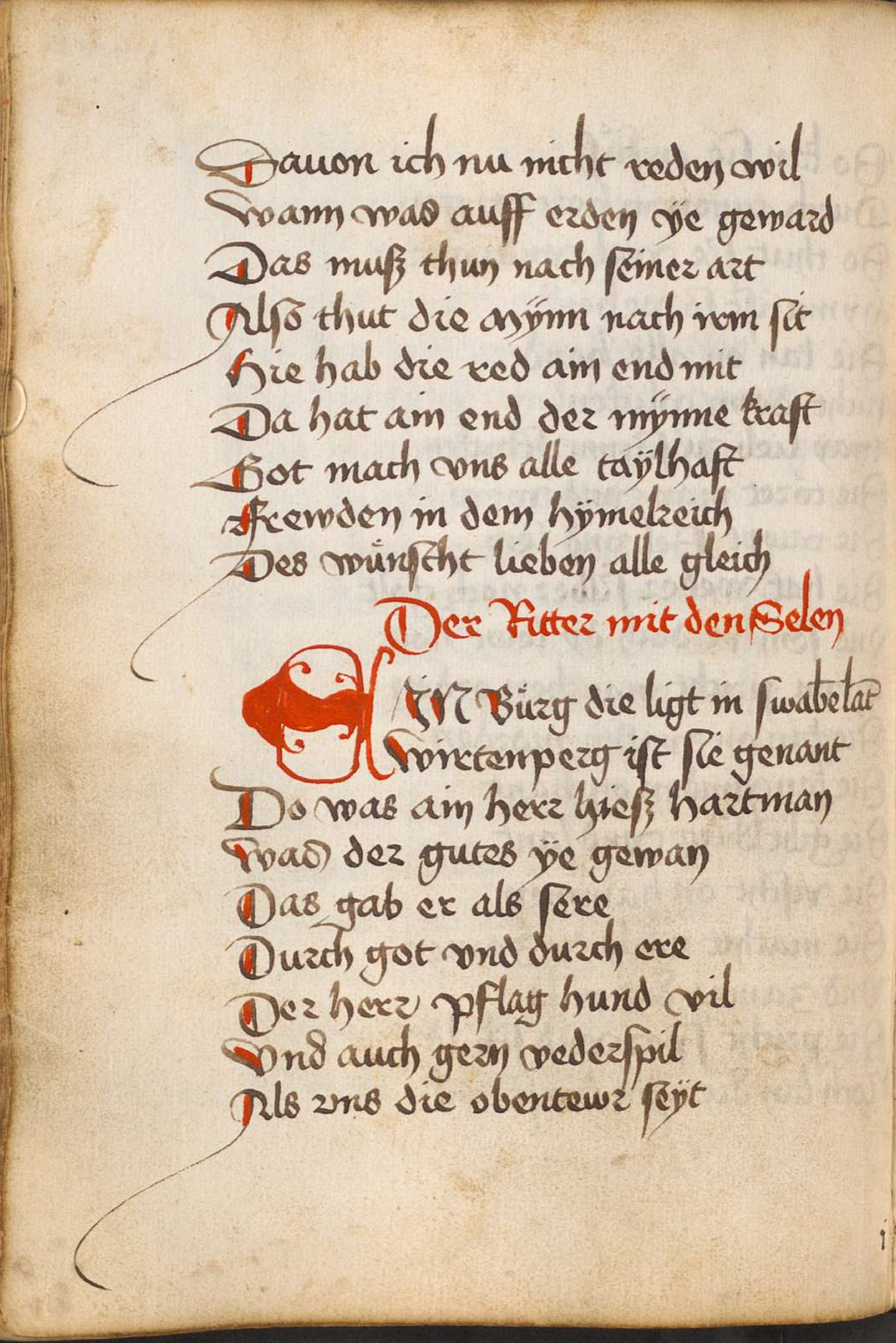 Minnereden. Mären. Fastnachtsspiele - BSB Cgm 714, [S.l.] Raum Nürnberg, 3. Viertel 15. Jh. [BSB-Hss Cgm 714]